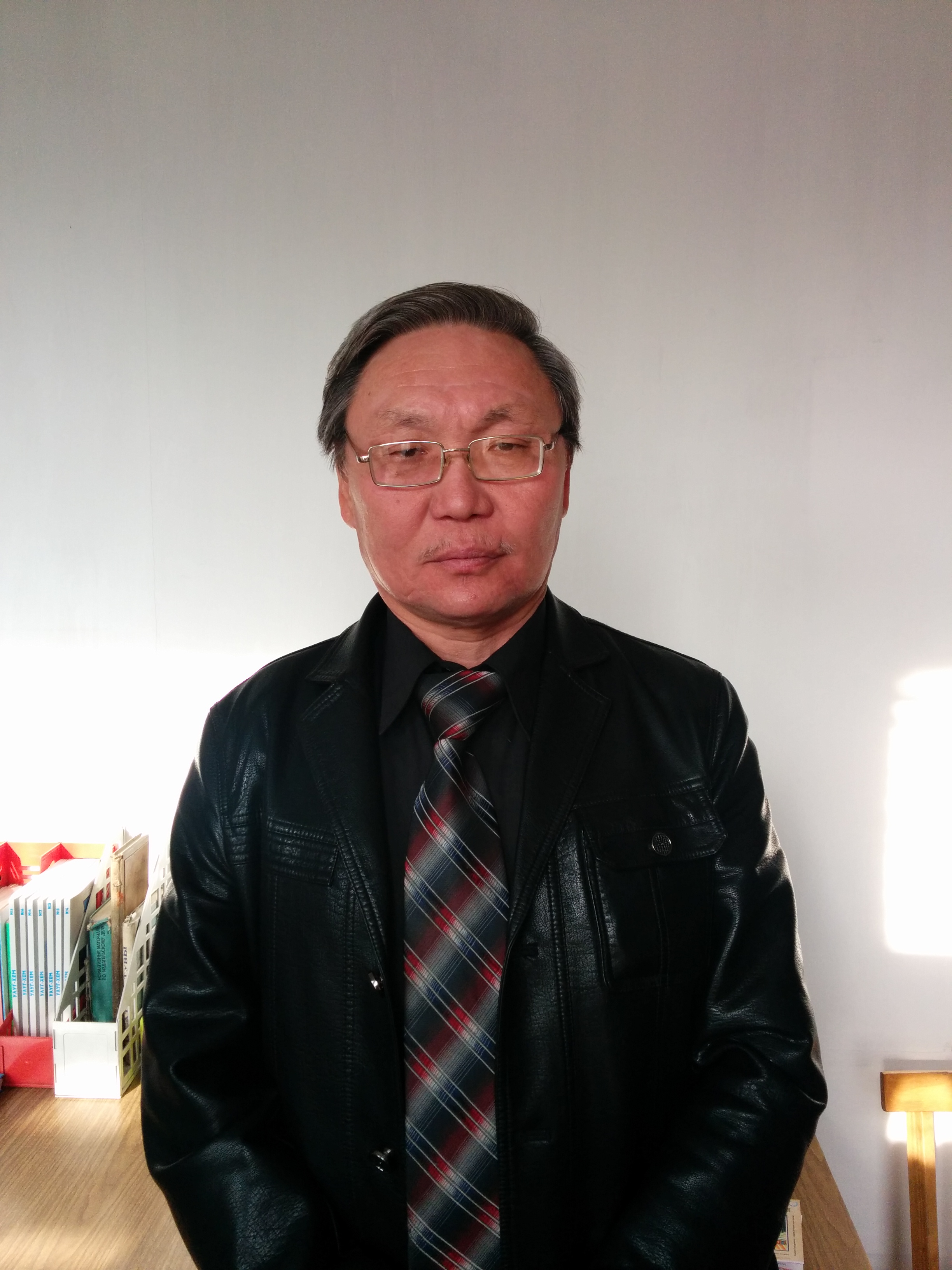 Тыва дыл: Тыва чогаалчы, Тываның Чогаалчылар Эвилелиниң удуртукчузу, Мижит, Эдуард Баир-оглу, 2014 чыл